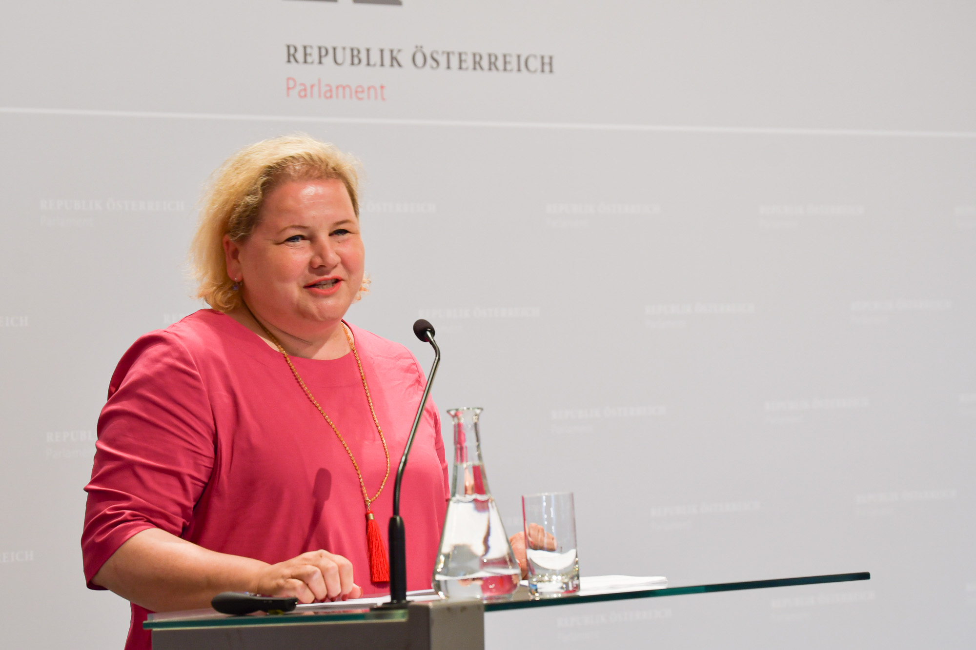 Kindern Wege öffnen. Das Recht auf Bildung von Anfang an.